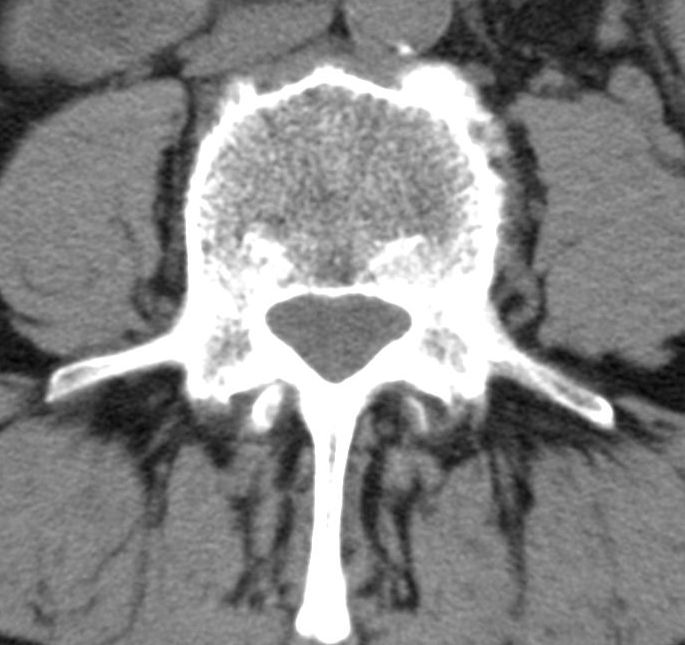 Bildbeschreibung: Spondylophyten Quelle: eigene Aufnahme Autor: User:Scuba-limp